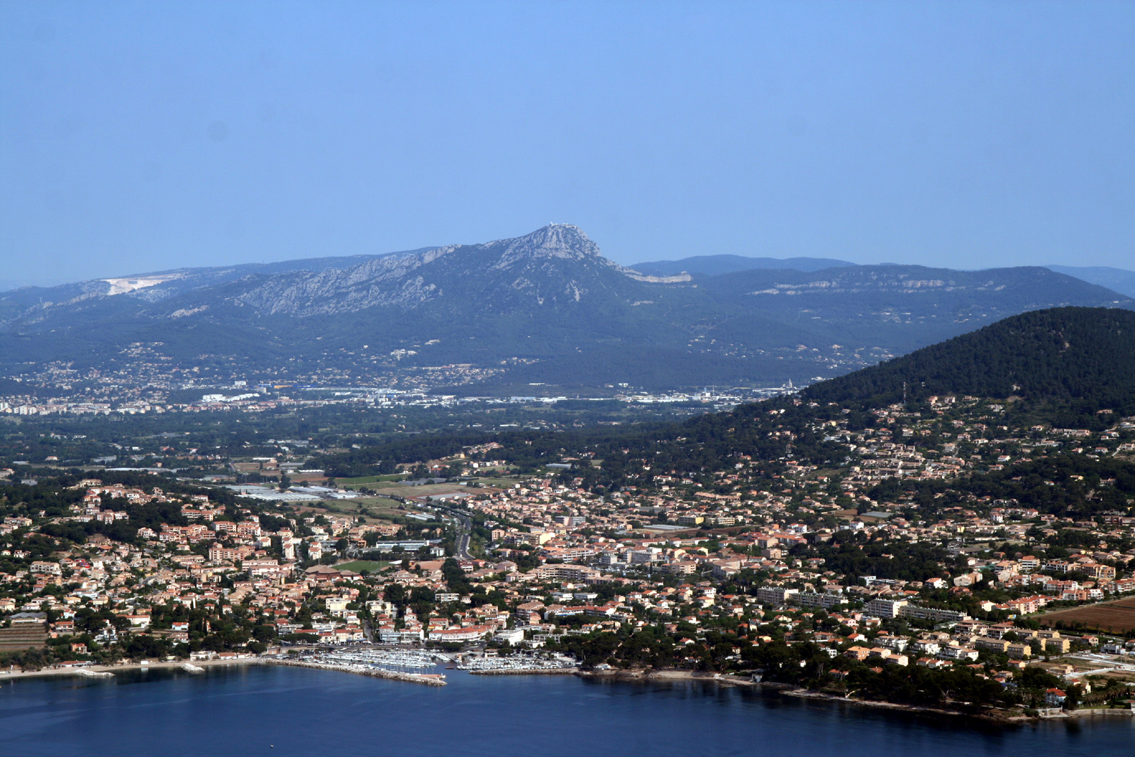 Carqueiranne vue d'avion